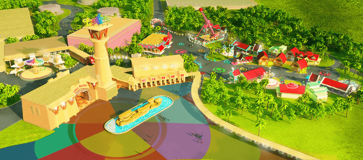 Dunia Kartun adalah kawasan terbaru di Dufan yang terbangun diatas lahan sebesar 3 hektar